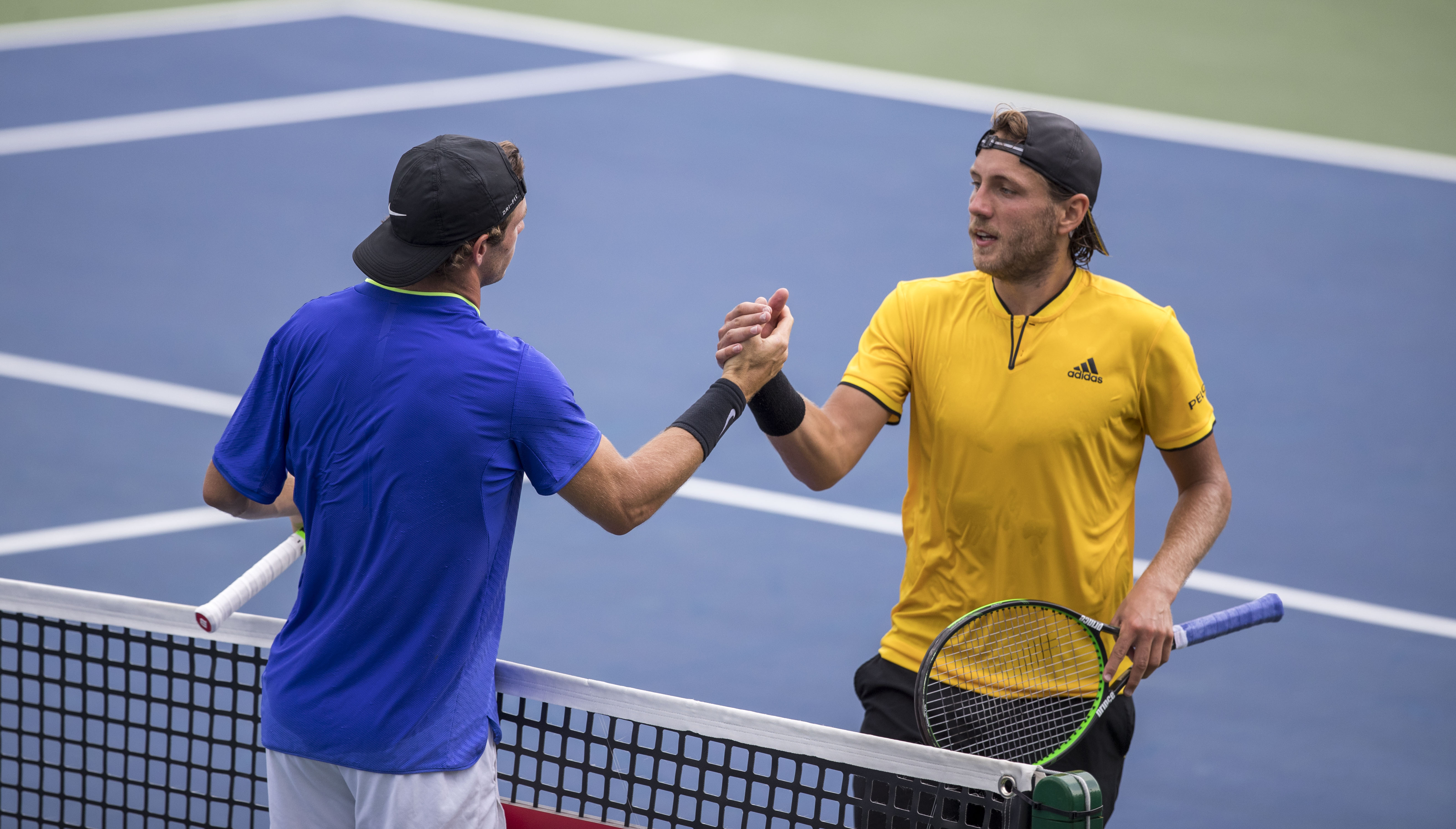 Citi Open Tennis 2017